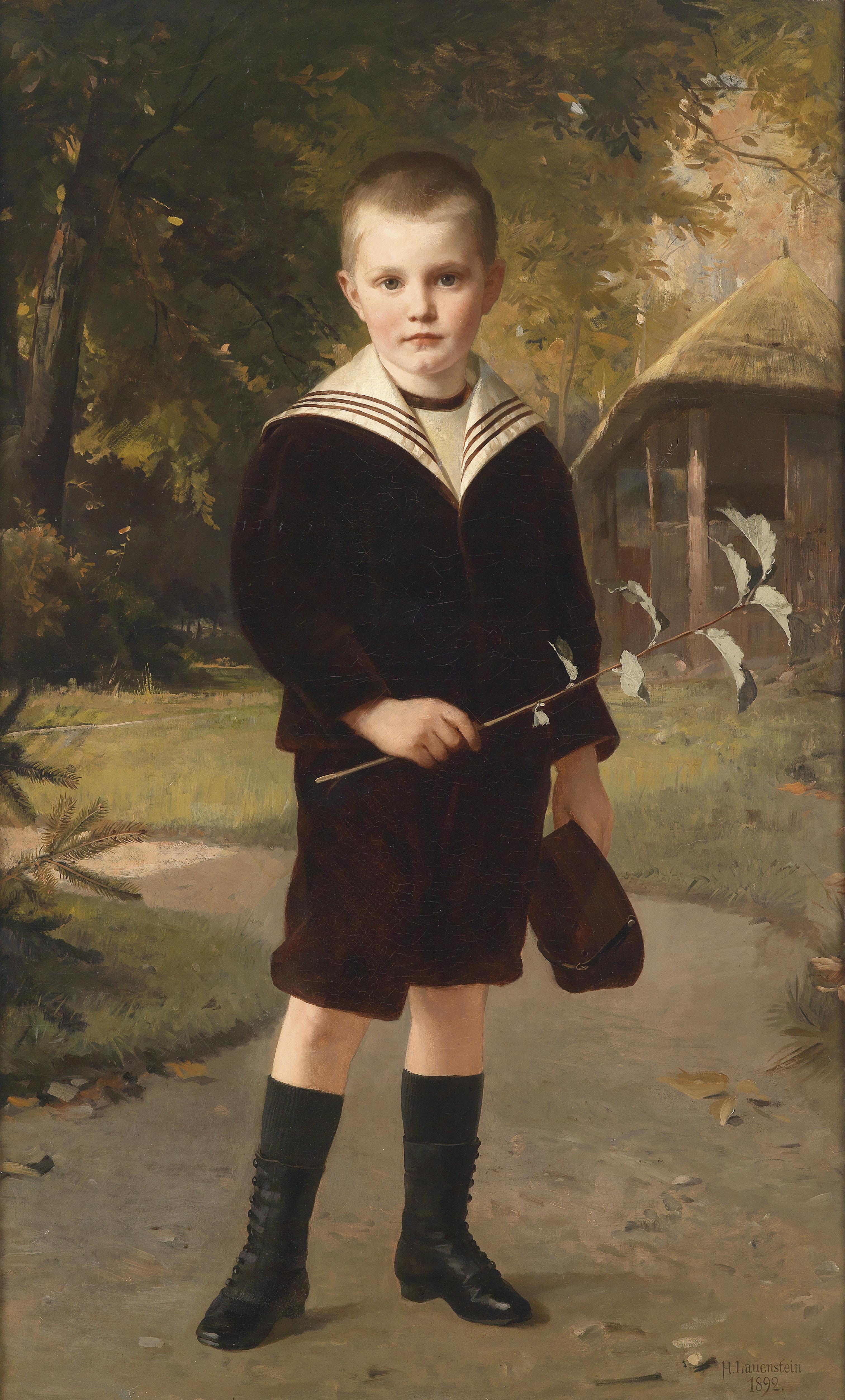 Junge im Matrosenanzug, signiert, datiert H. Lauenstein 1892